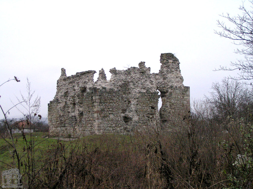 Замок в Середньому на Закарпатті (грудень 2004 року)